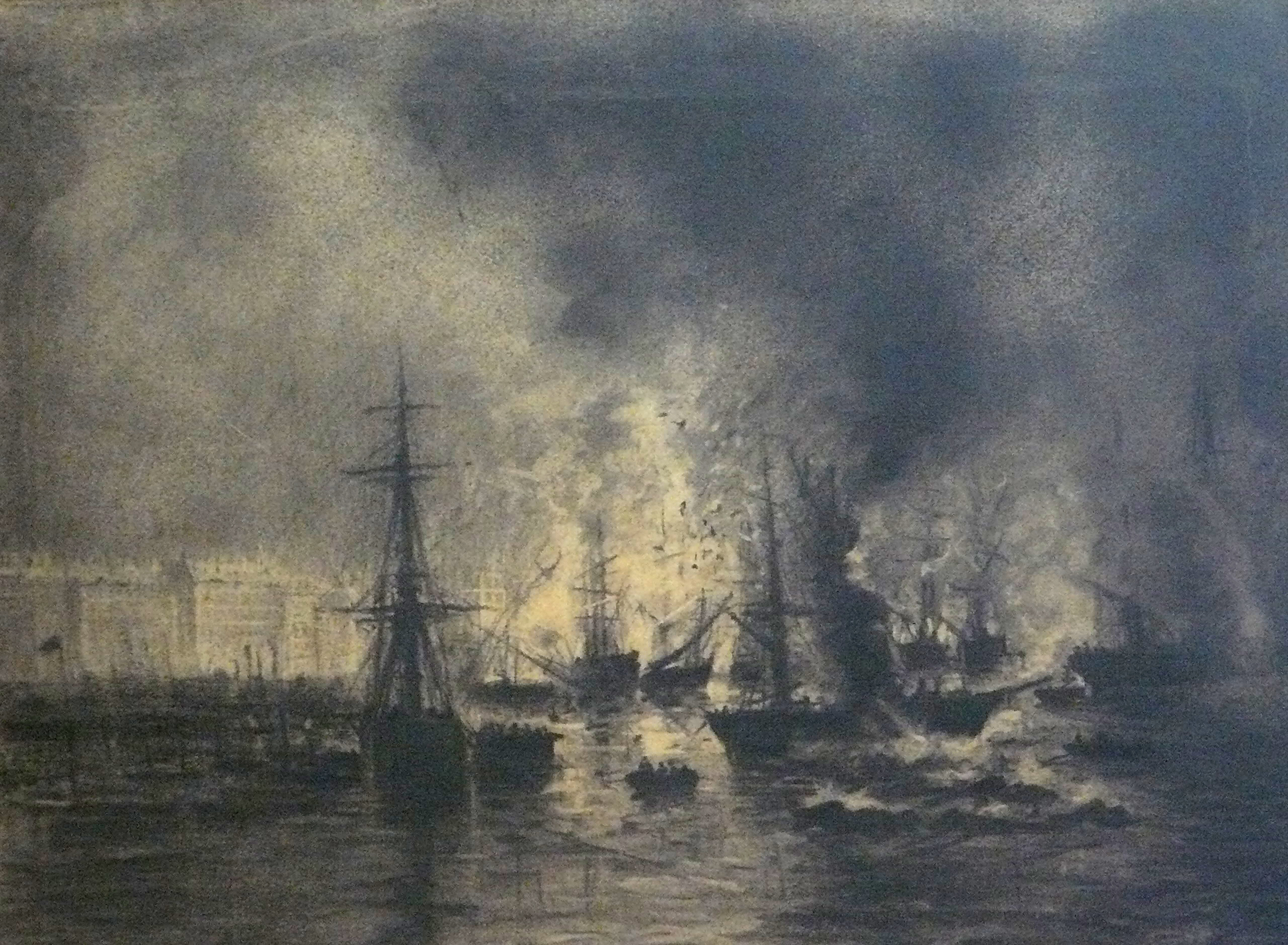 Lalanne M. attr. - Charcoal - Incendie du Port de Bordeaux du 28-29 septembre 1869 - 54x42cm; plusieurs gravures figurent au musée de Bordeaux avec cette même vue.